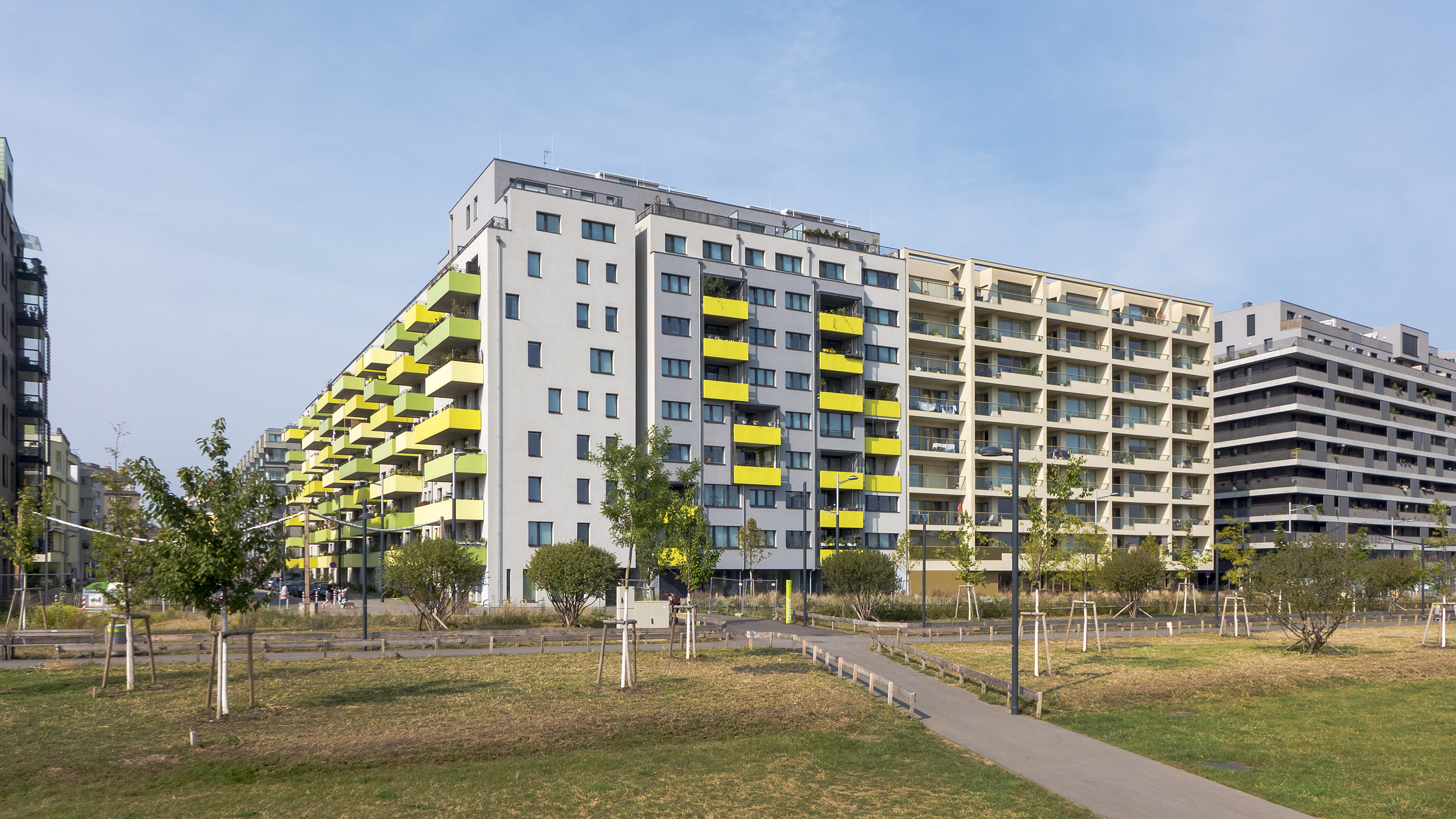 Sonnwendviertel in Wien 10 beim Helmut-Zilk-Park